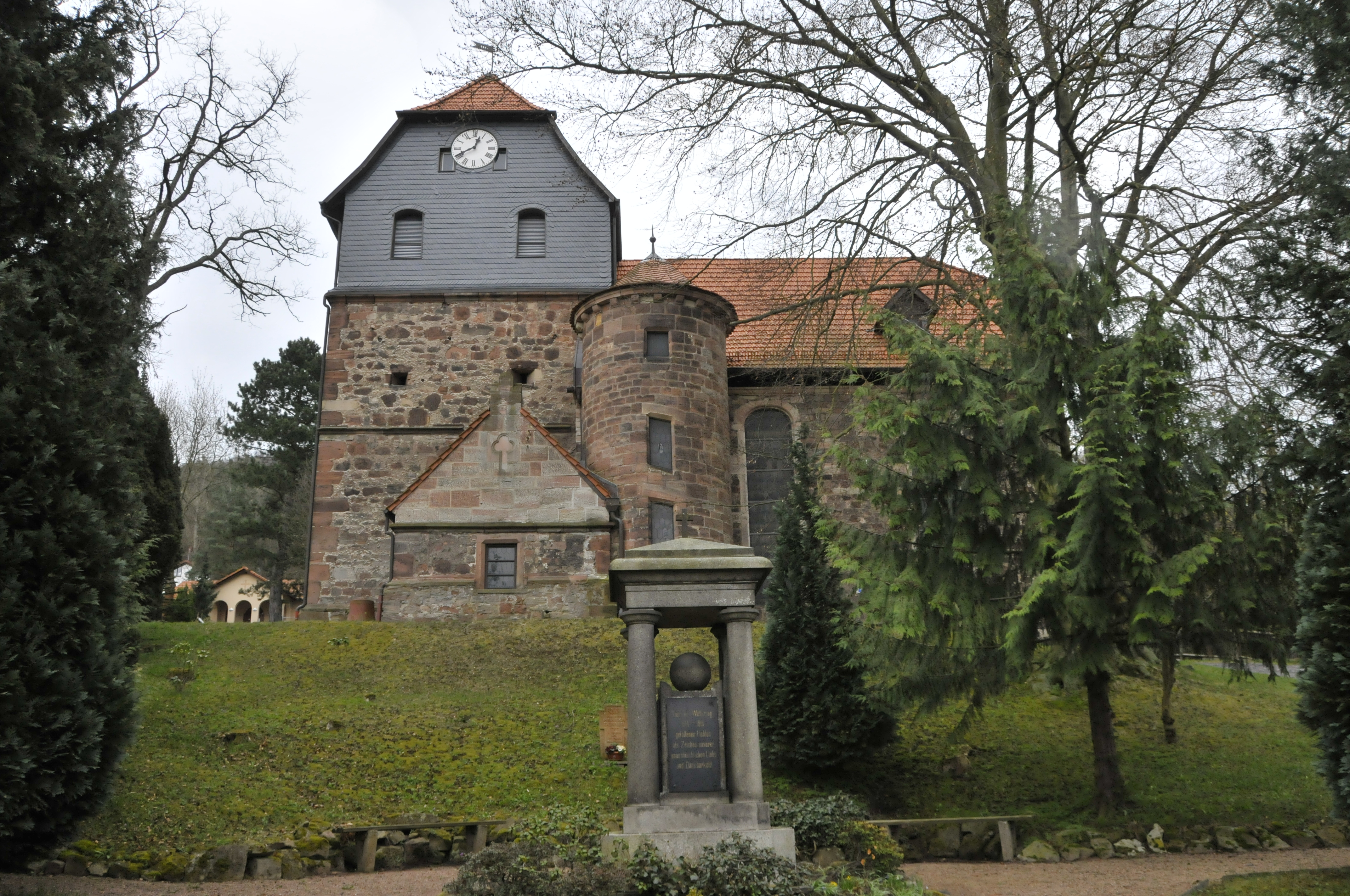 Merkers, Kieselbach, Kirche mit Kriegerdenkmal